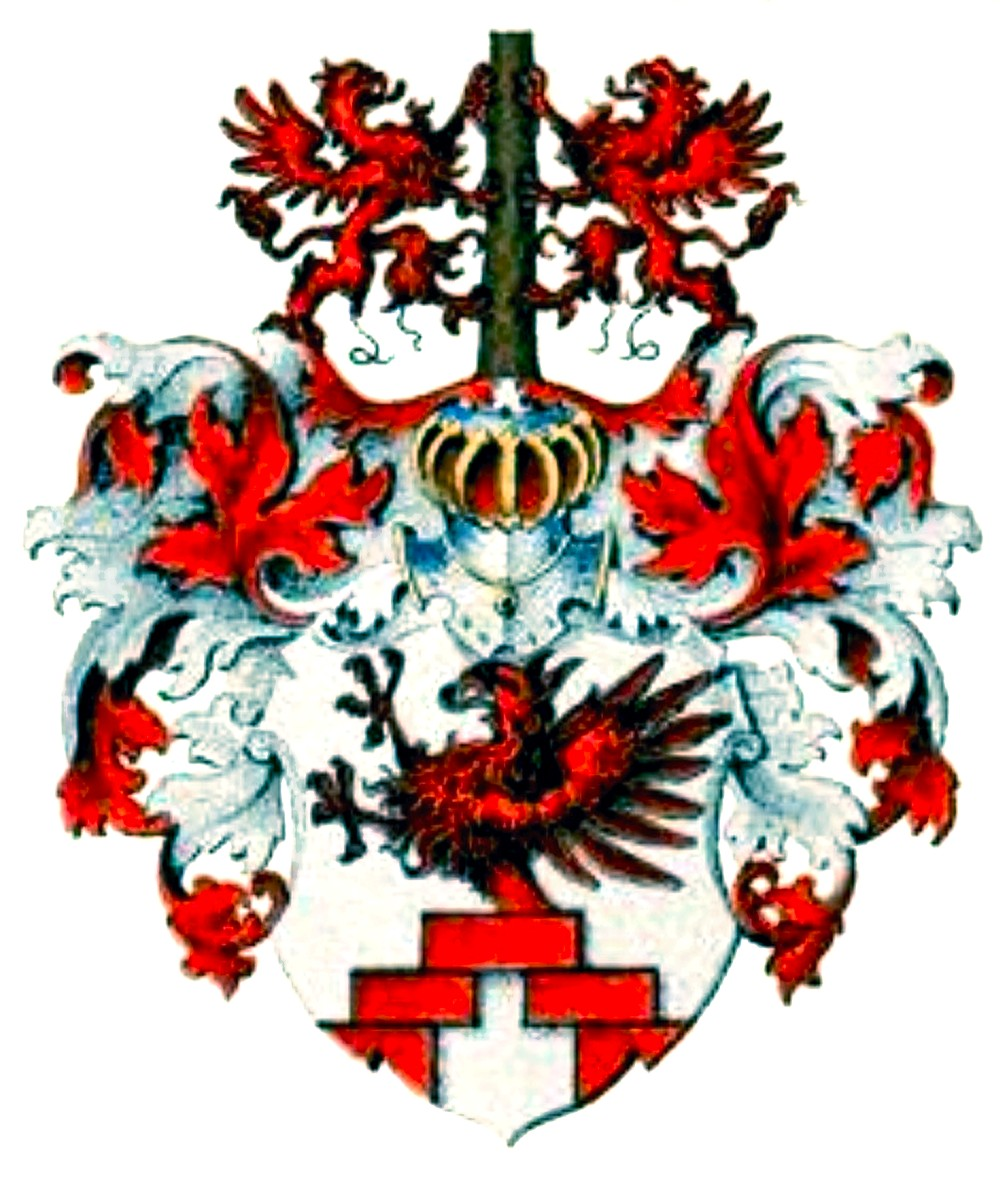 Stammwappen derer von Bohlen im Baltischen Wappenbuch